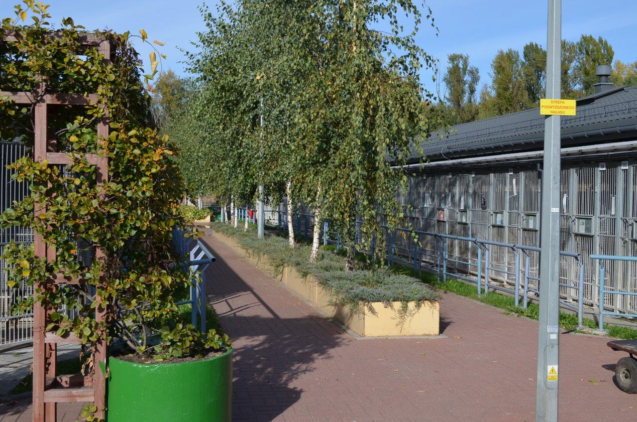 pawilony